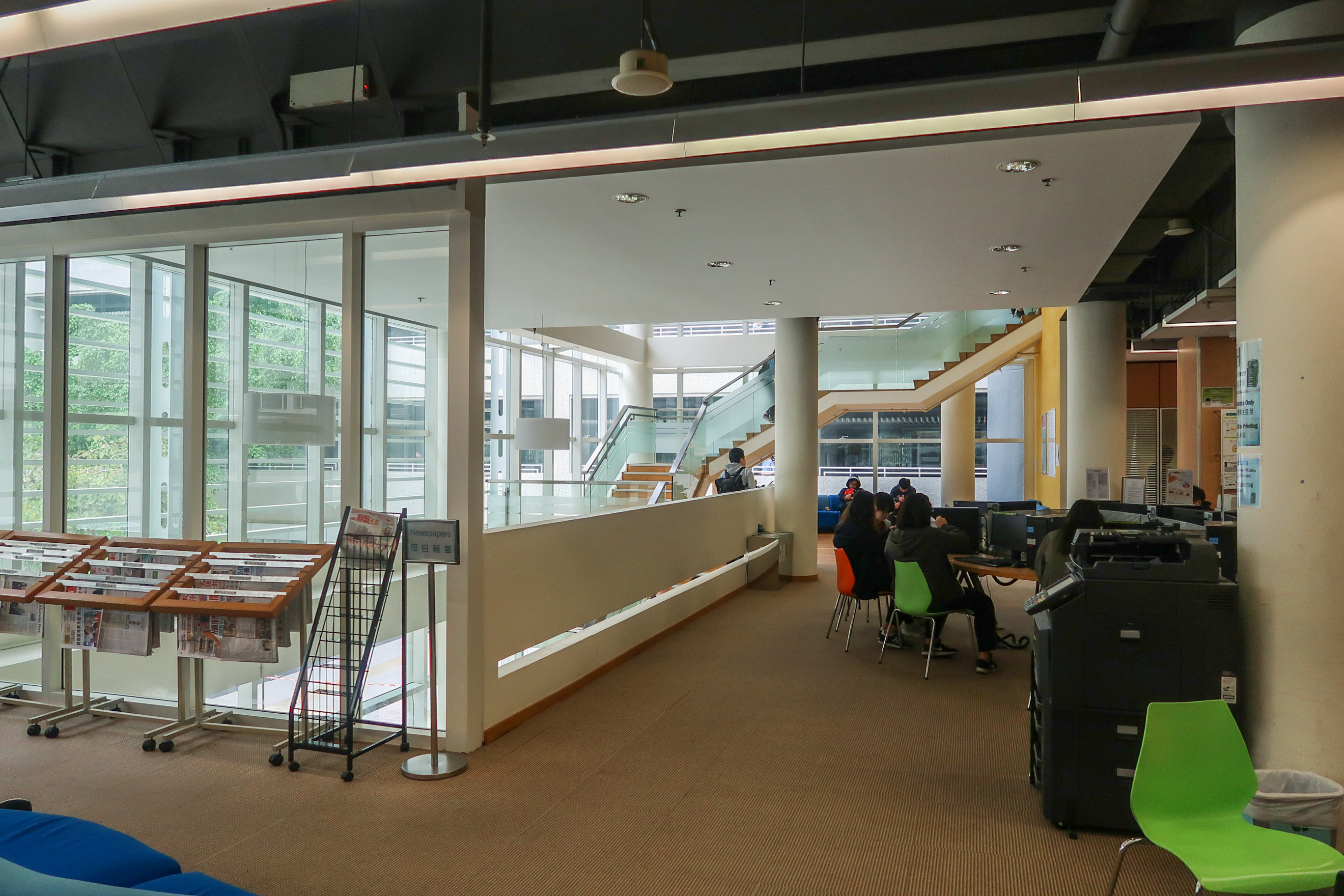 IVE Chai Wan Campus